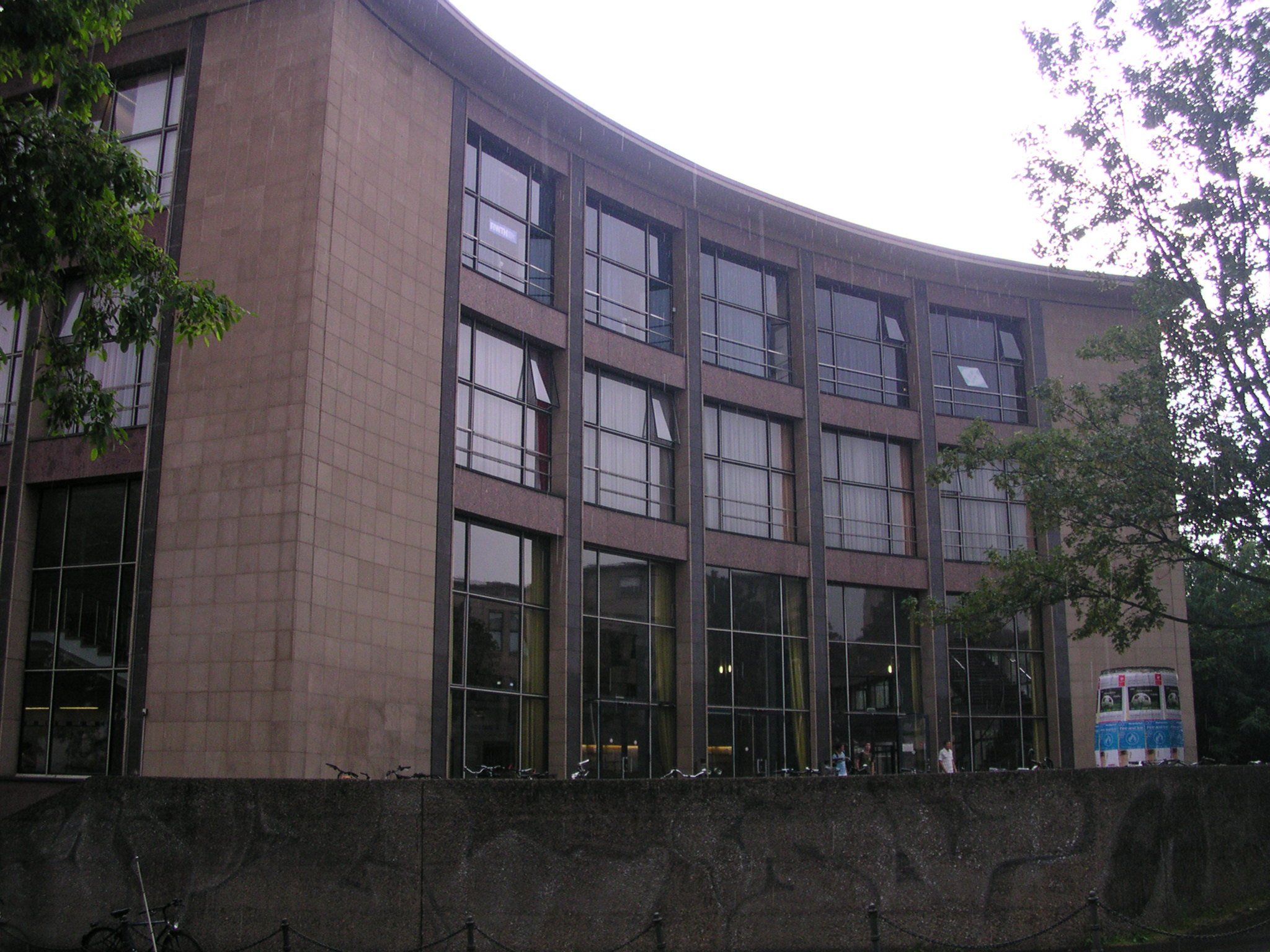 Aachen, Audimaxgebäude der RWTH